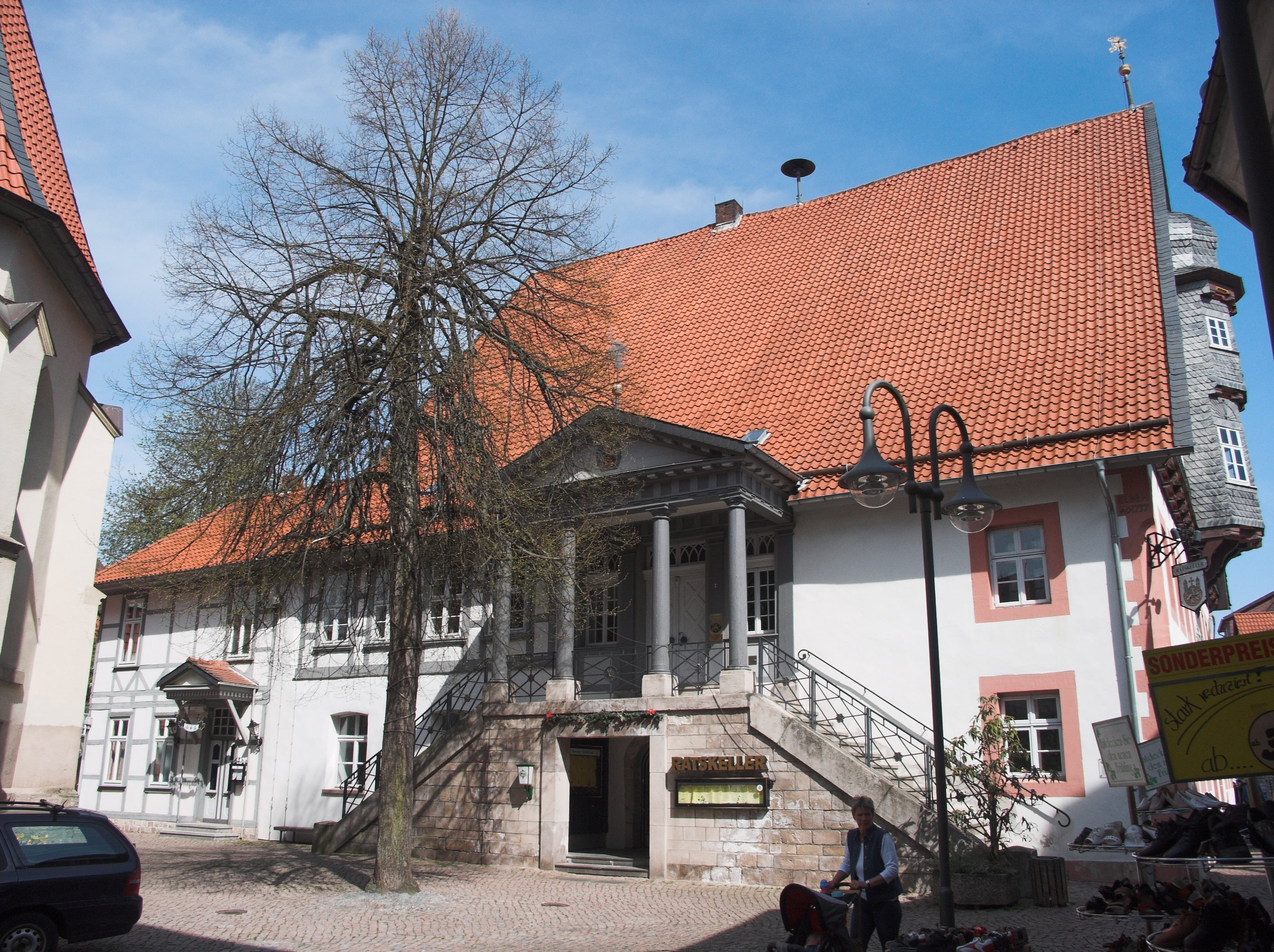 Seitenansicht des alten Rathauses von Osterode am Harz